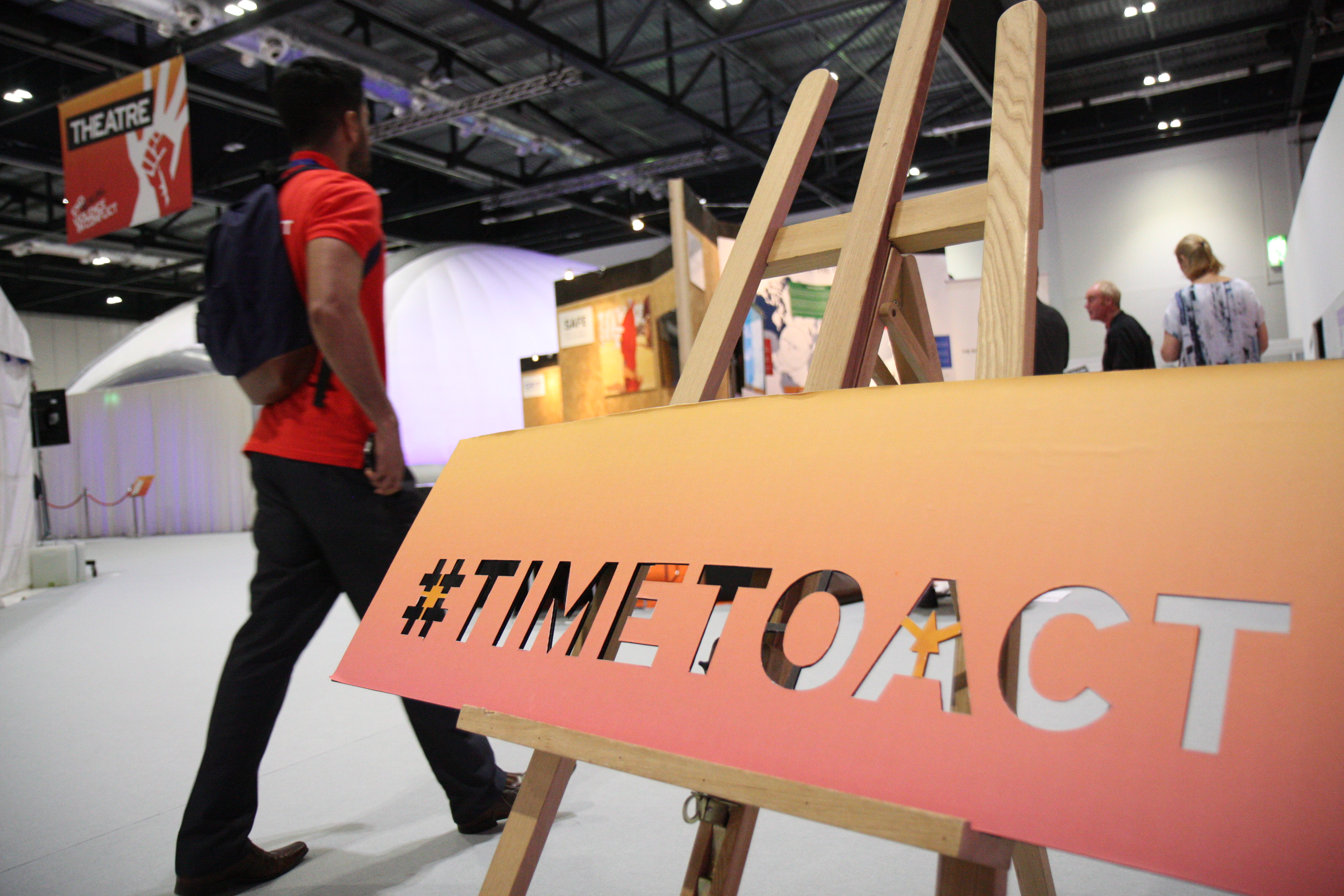 Summit Fringe, 10 June 2014.